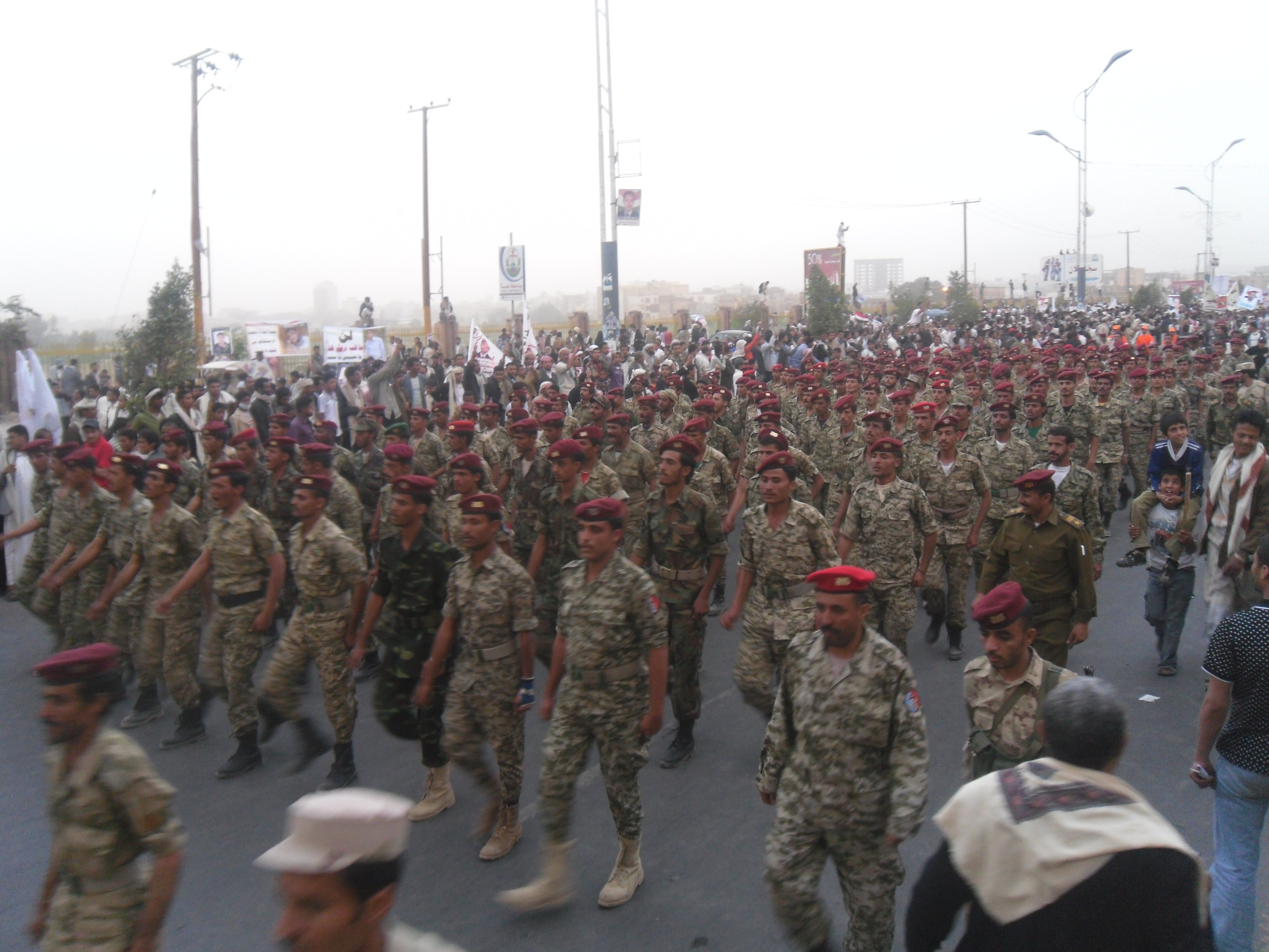 من فعاليات العرض العسكري في ذكرى مجزرة جمعة الكرامة اثناء شباب الثورة اليمنية بتايح 18 مارس 2012